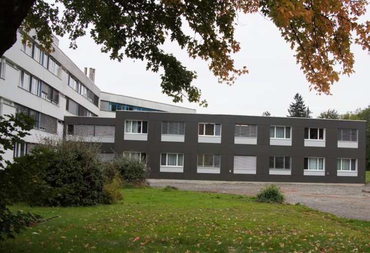 Bettenprovisorium des Regionalspitals Lachen, Kanton SZ, Schweiz